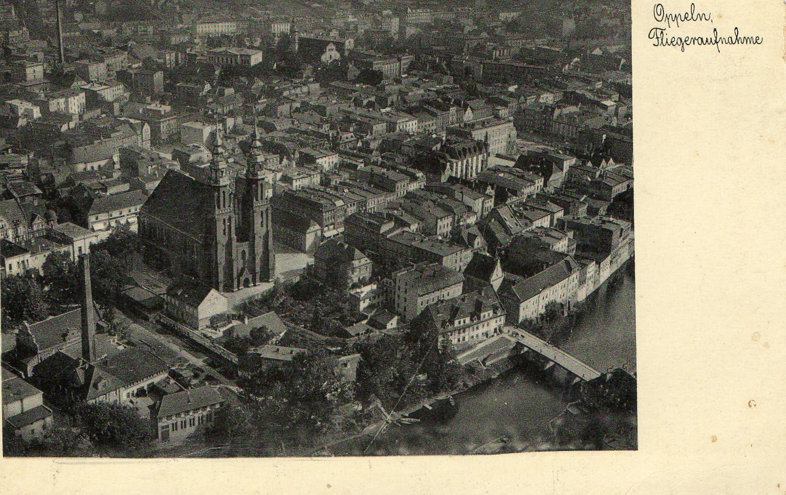 Oppeln von oben, ohne Rathausturm